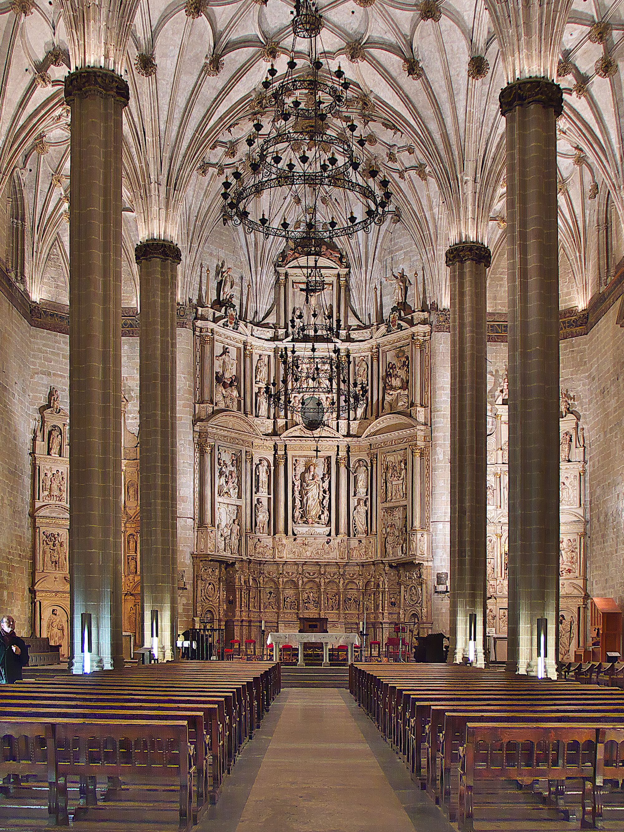 Nave central con el presbiterio al fondo. Juan Segura cierra la fábrica con unas espectaculares bóvedas y sus claves (1528-1533), claramente de tipología renacentista.